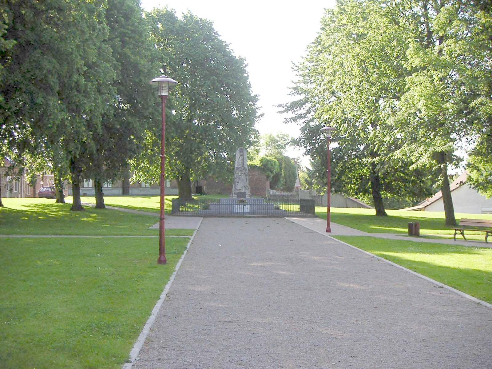 Monument aux morts de Oisy-le-Verger (Pas-de-Calais). Morts pour la France (en 1914-18 et 1940-45). Monument installé sur la Place Verte. Padawane